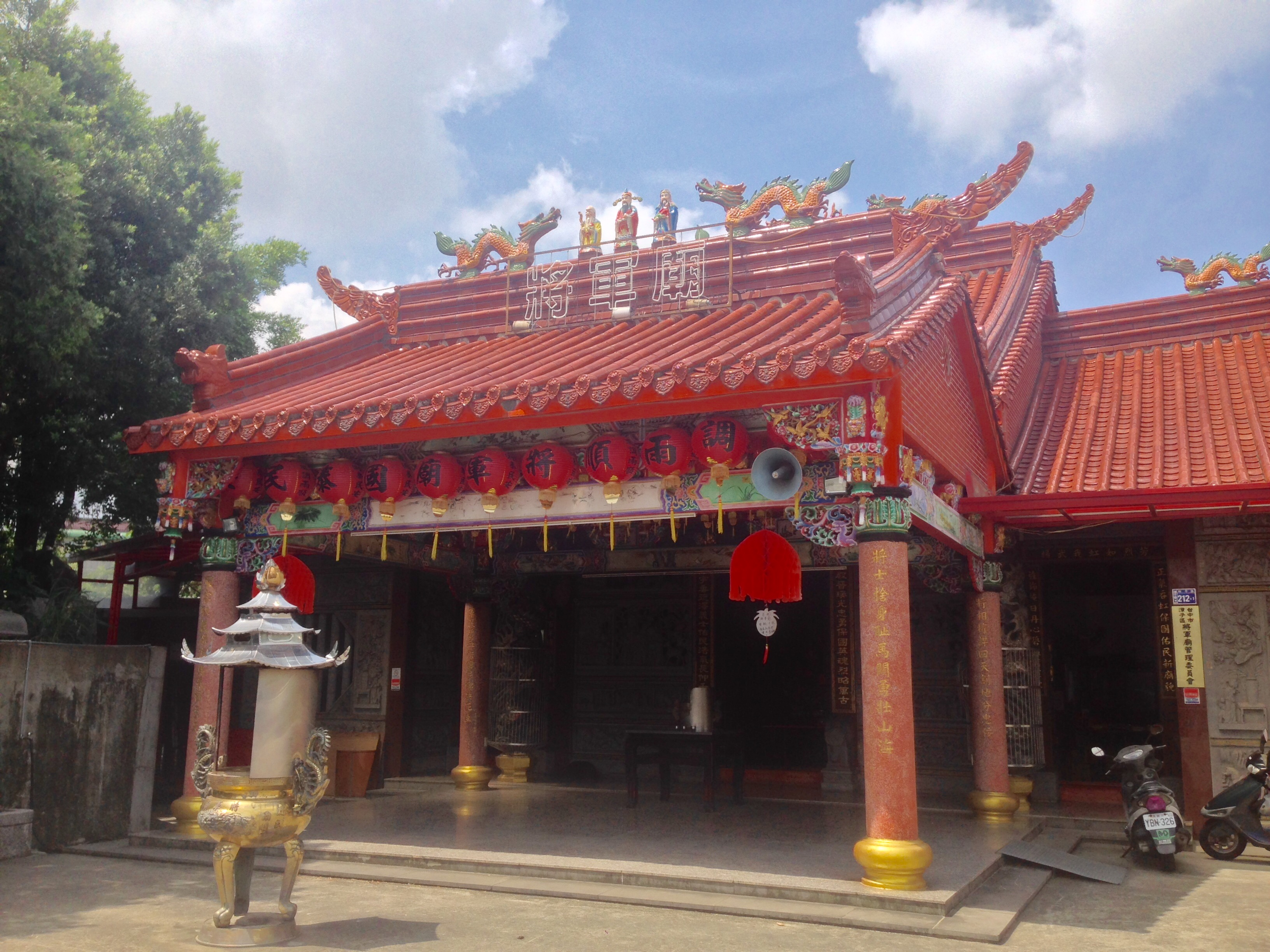 中文（台灣）: 潭子將軍廟近景